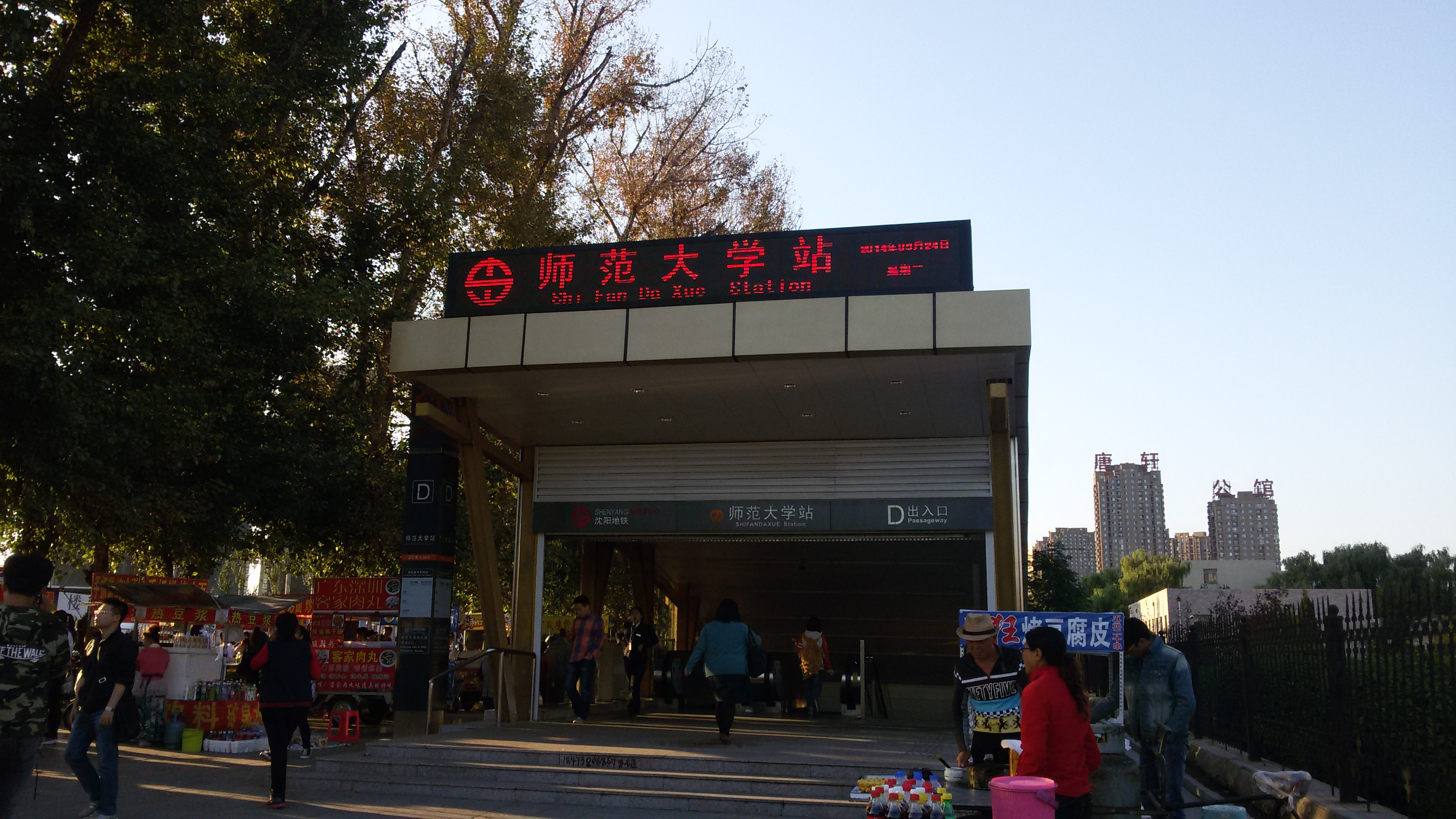 师范大学站D出入口